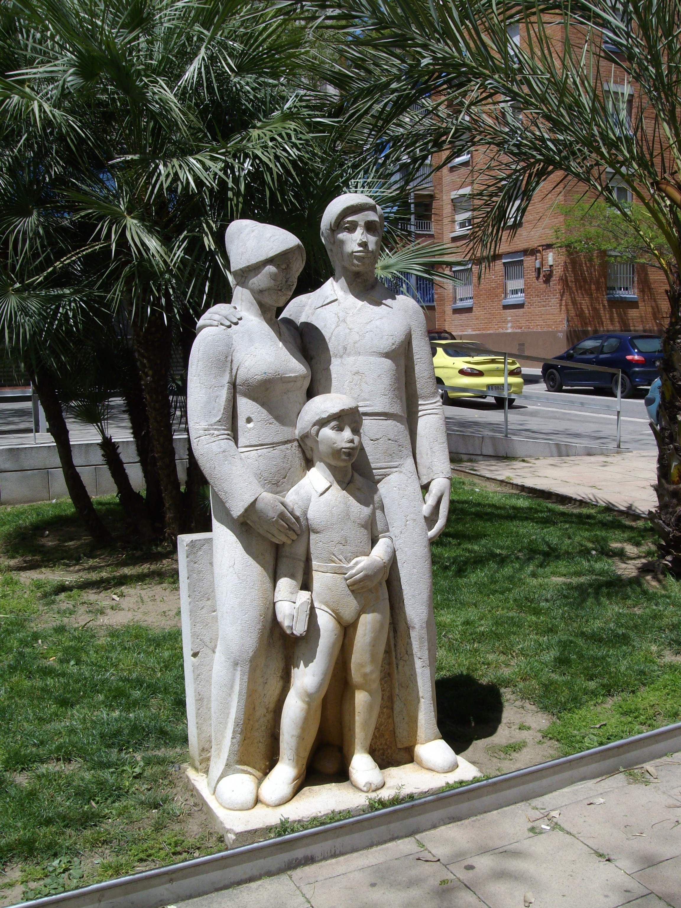 La Familia, escultura realizada en 1973 por Sebastià Badia Cerdà, situada en la plaza Llívia, en Sabadell, Barcelona (España).